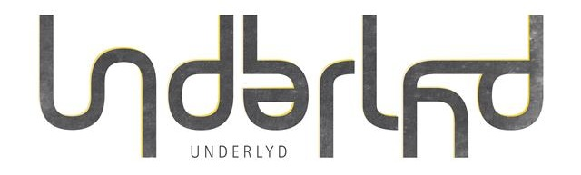 Underlyds logo